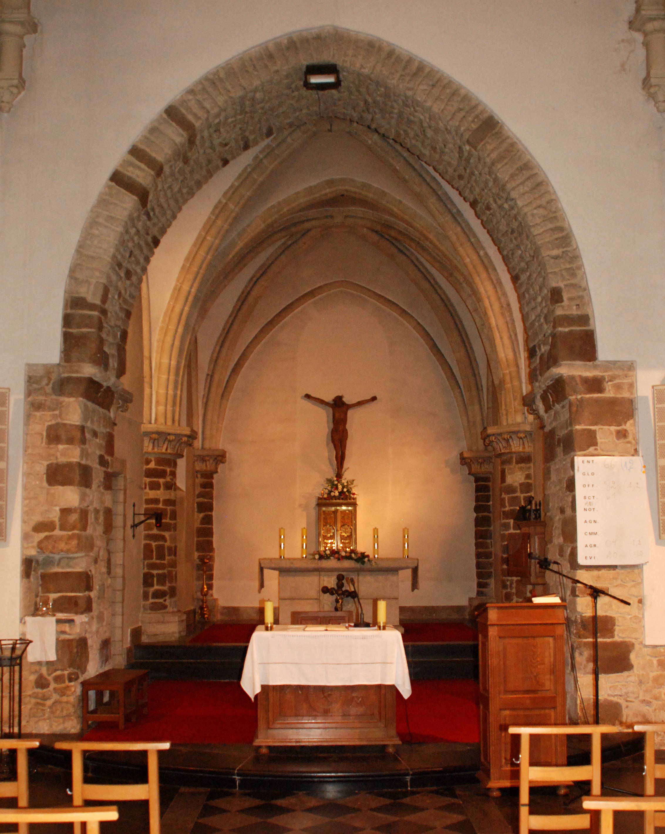 Belgique - Brabant wallon - Chaumont-Gistoux - Église Saint-Bavon de Chaumont